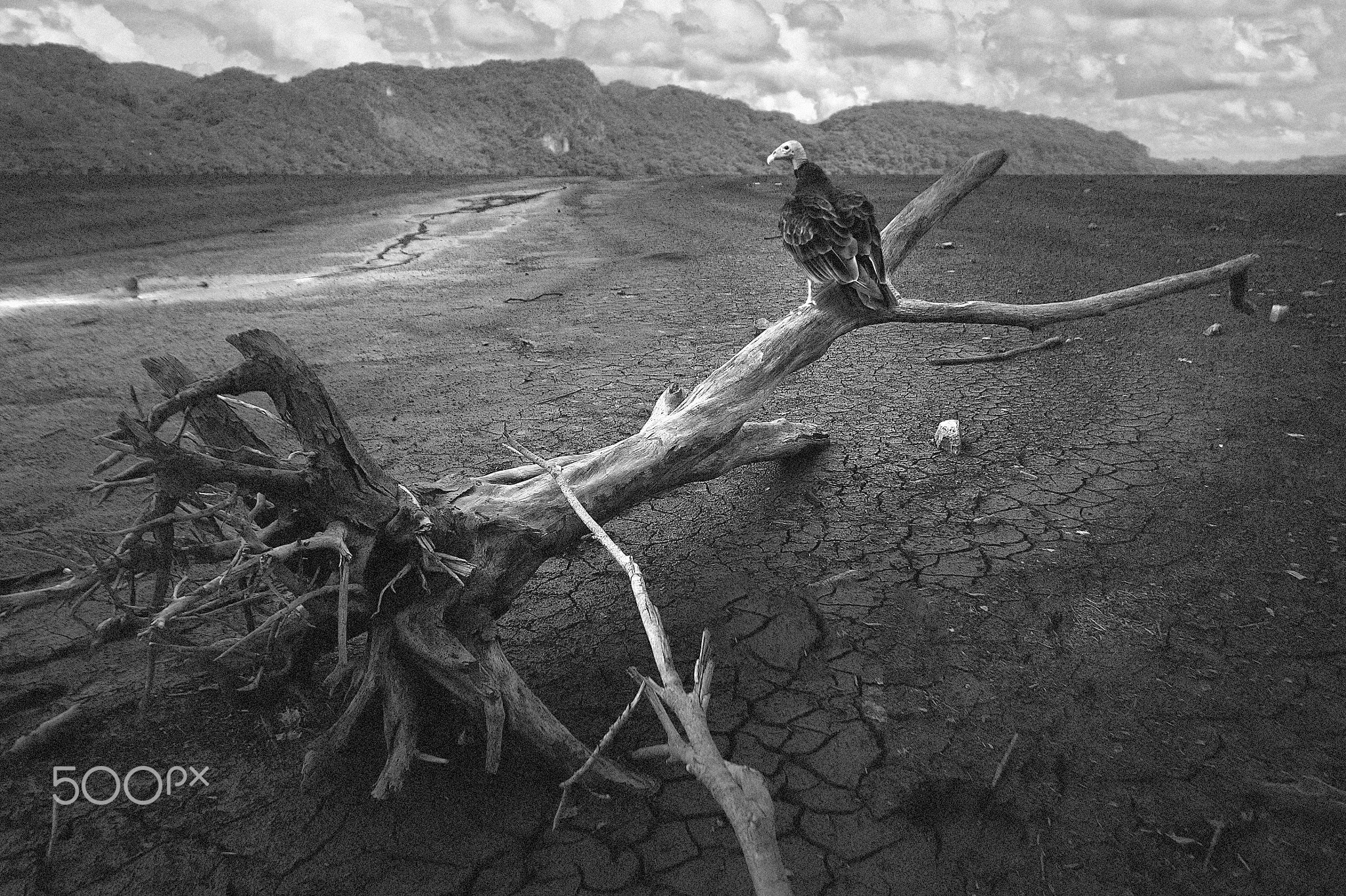 500px provided description: 11 0106 Jpg [#blanco y negro ,#ave ,#decierto]